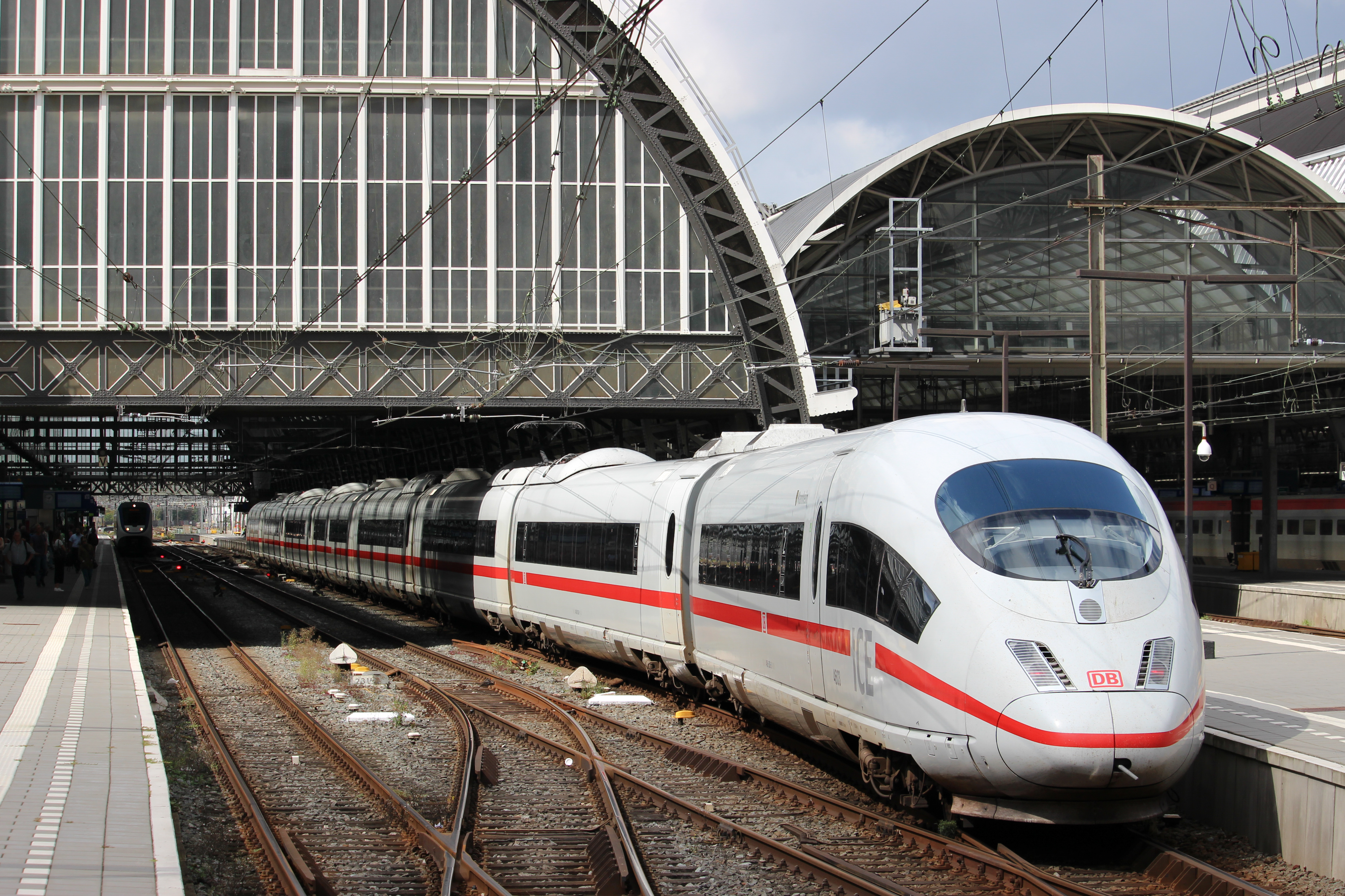 ICE International ICE 3M van Deutsche Bahn in Amsterdam